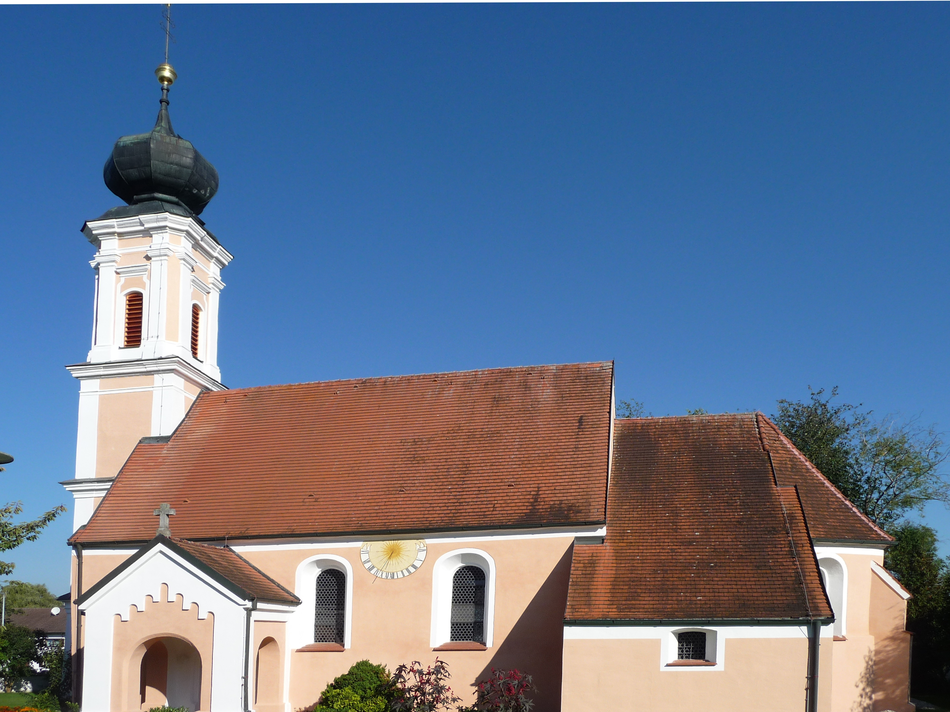 Die Filialkirche St. Martin in Kühnham